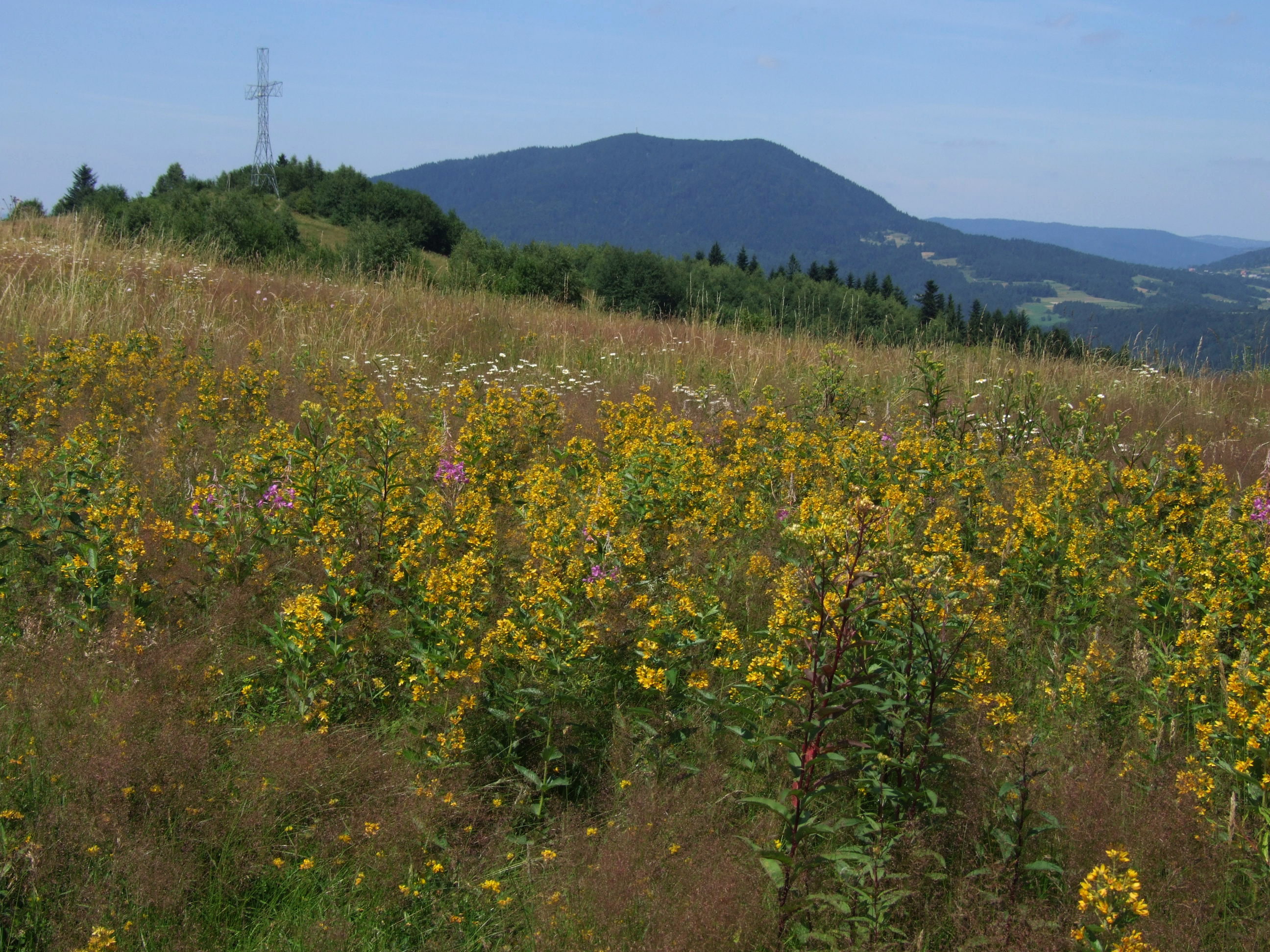 Potaczkowa i krzyż milenijny. W głębi Luboń Wielki